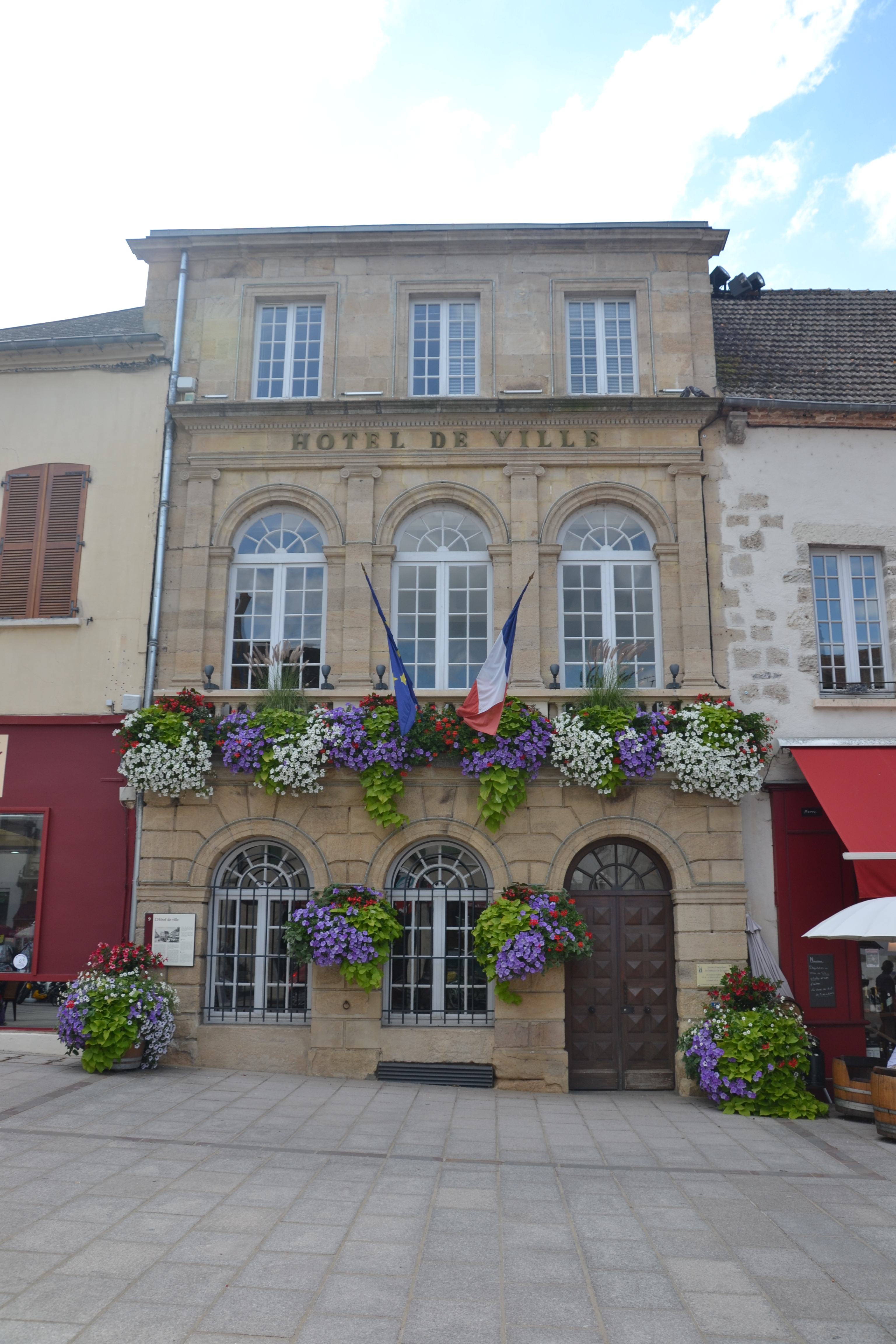 mairie de Saint-Pourçain-sur-Sioule